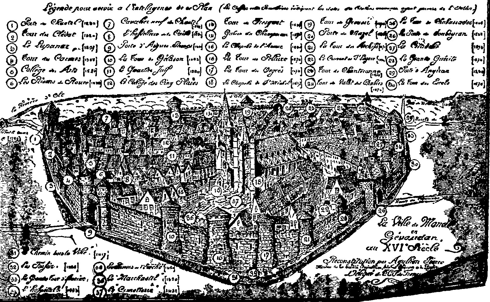 Gravure : plan de la ville de Mende au XVIe siècle.